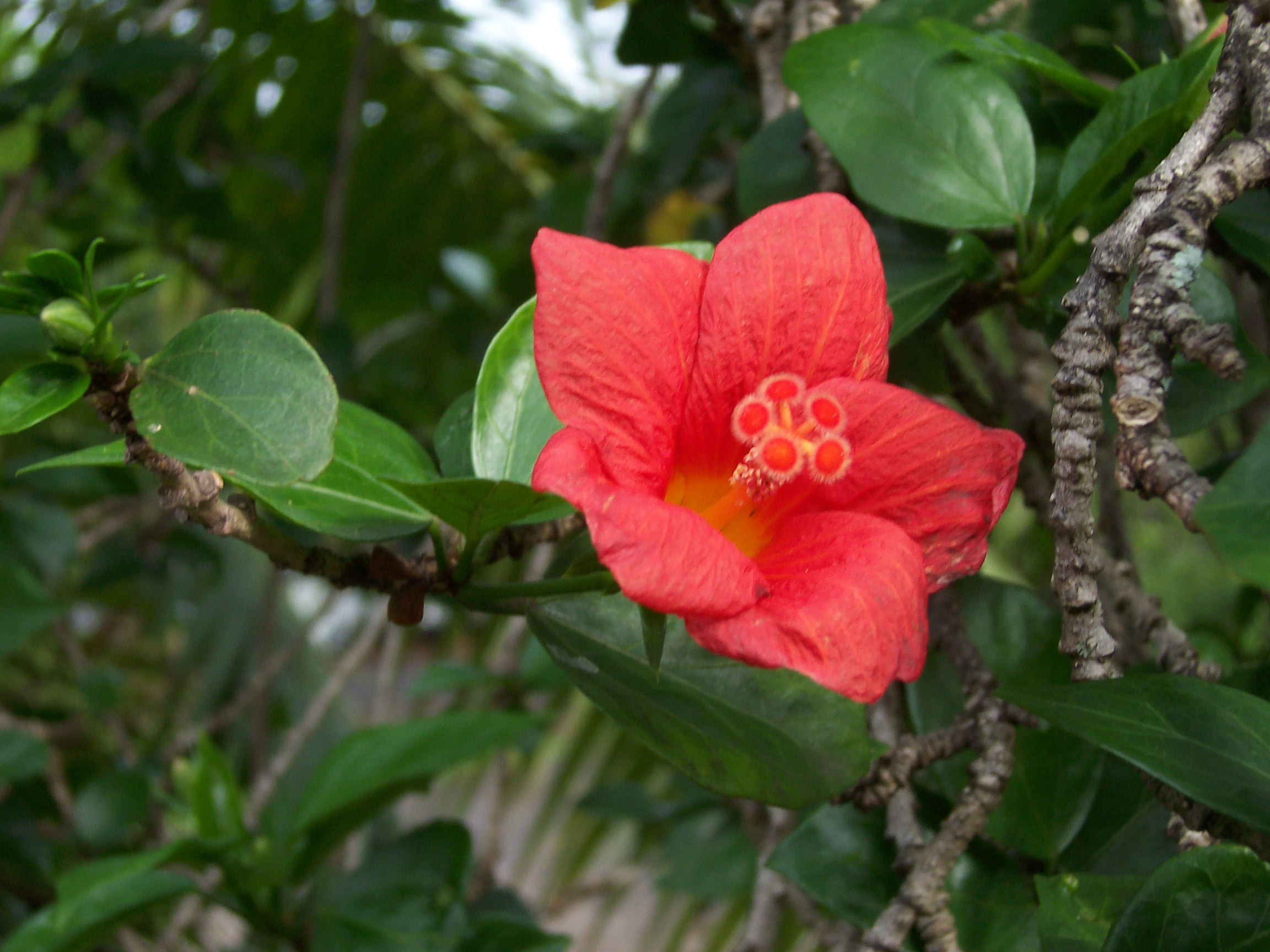 Foulsapatte marron ou Mahot bâtard (Hibiscus boryanus) - fleur Photo: B.navez - 23 FEB 2006 - Réunion island